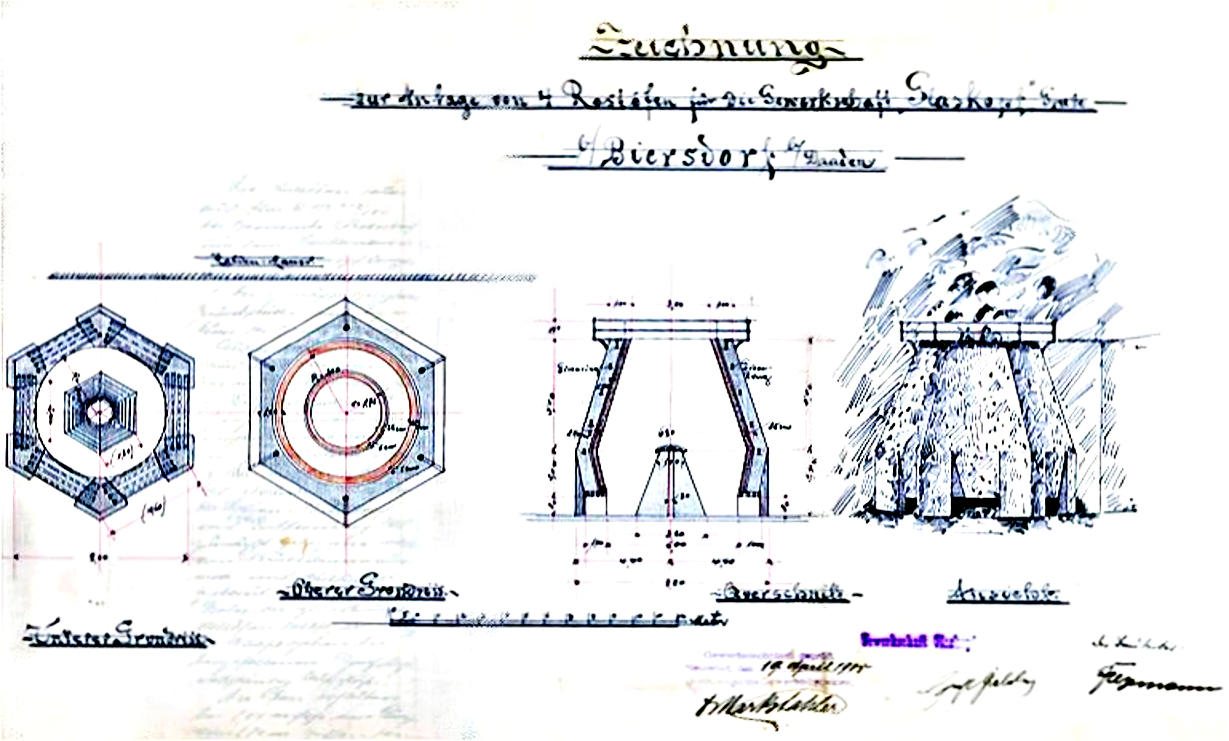 Plan des Röstofens der Grube Glaskopf in Biersdorf. Insgesamt wurden 4 dieser Öfen 1905 in der Nähe des Förderstollens errichtet. Die Höhe beträgt 9 m, der Durchmesser der sechseckigen Wandung 8 m. Reste eines Originalofens sind noch erhalten. Abbildung aus dem Archiv von Karl Heupel.